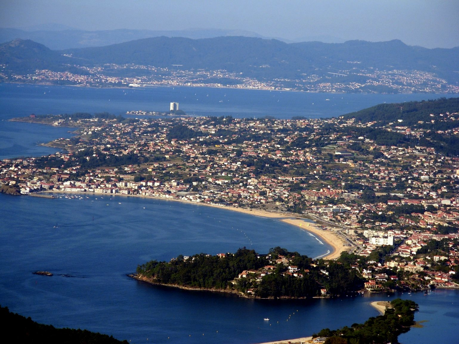 Playa America